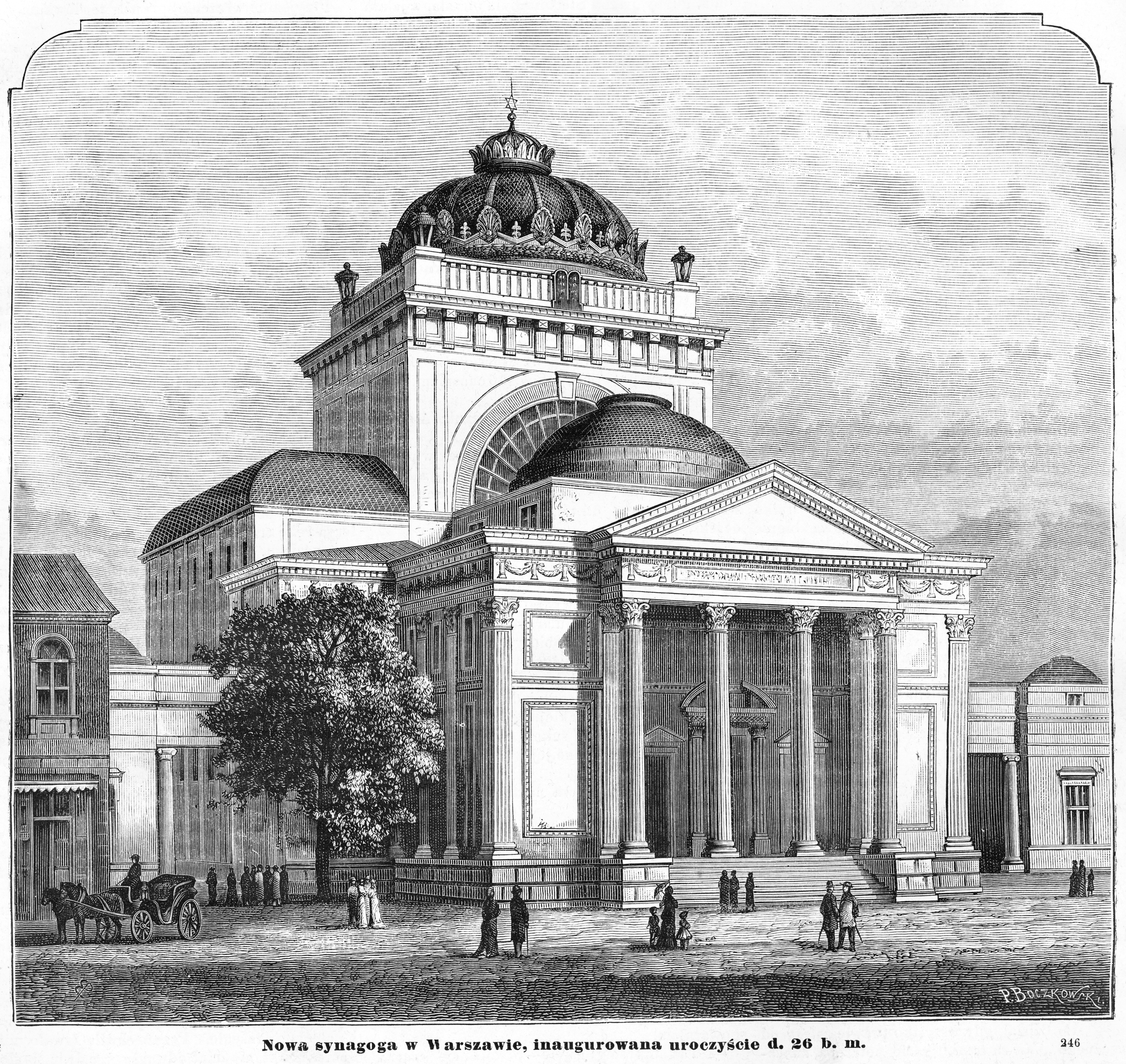 Nowa synagoga w Warszawie, inaugurowana uroczyście d. 26 b. m.